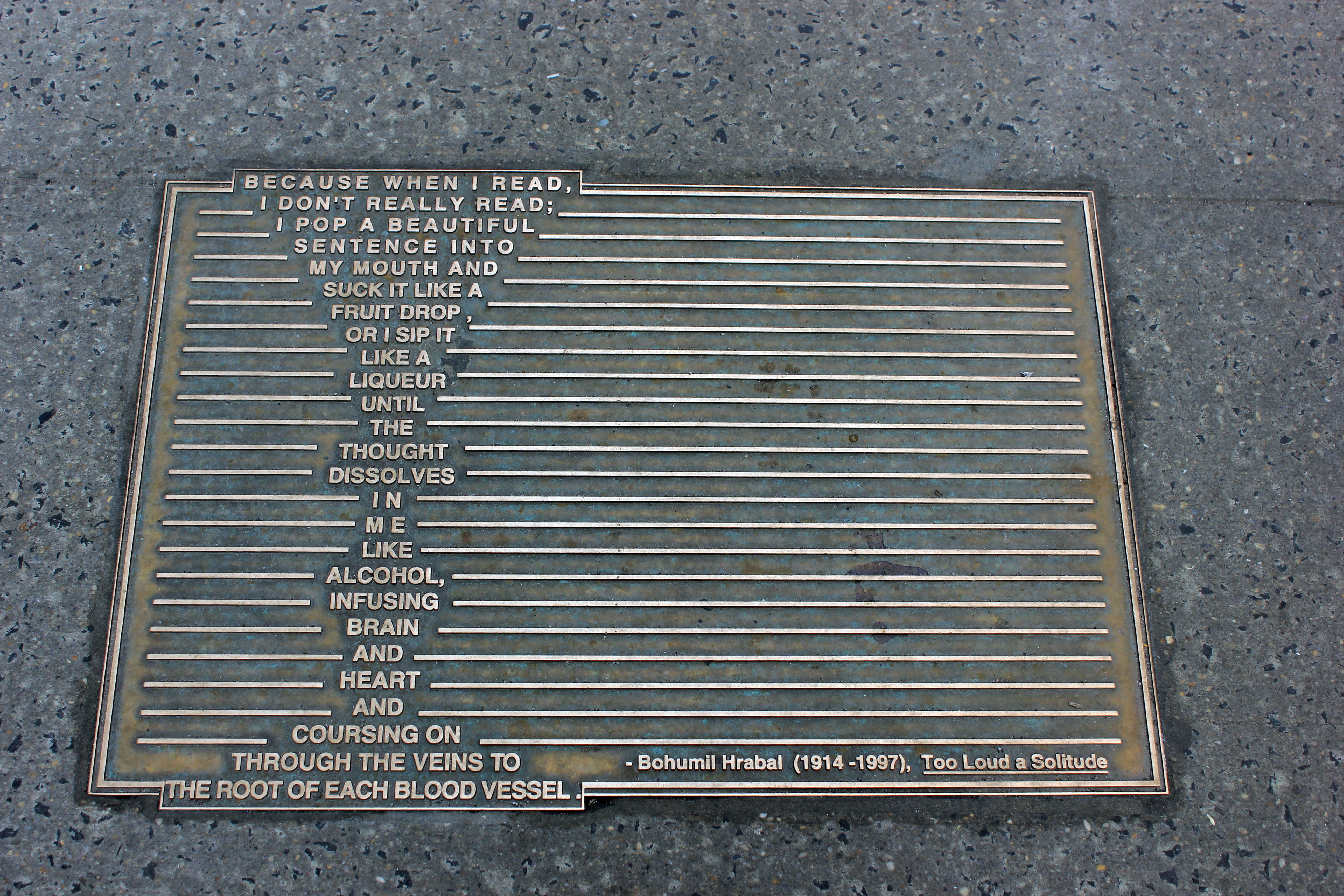 Library Walk New York City